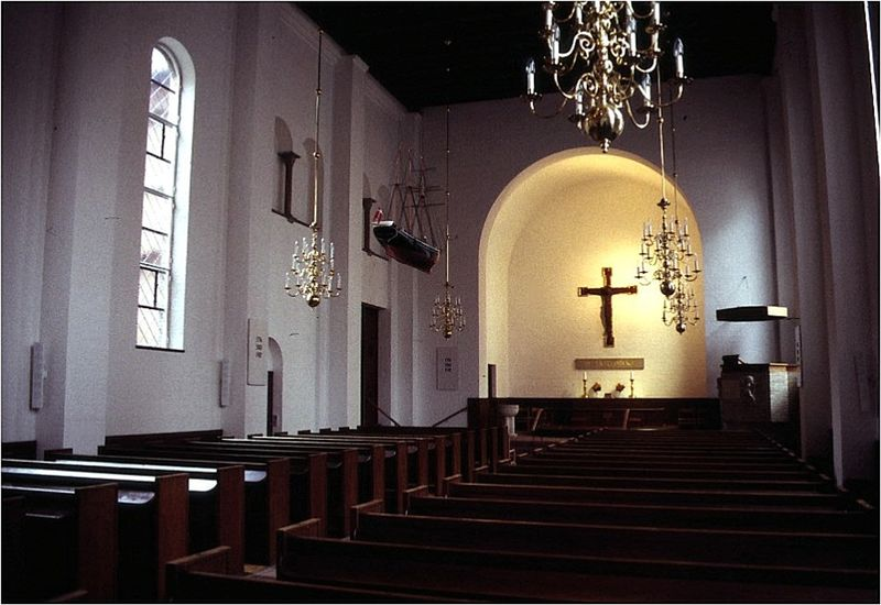 Absalons Church in Copenhagen, denmark